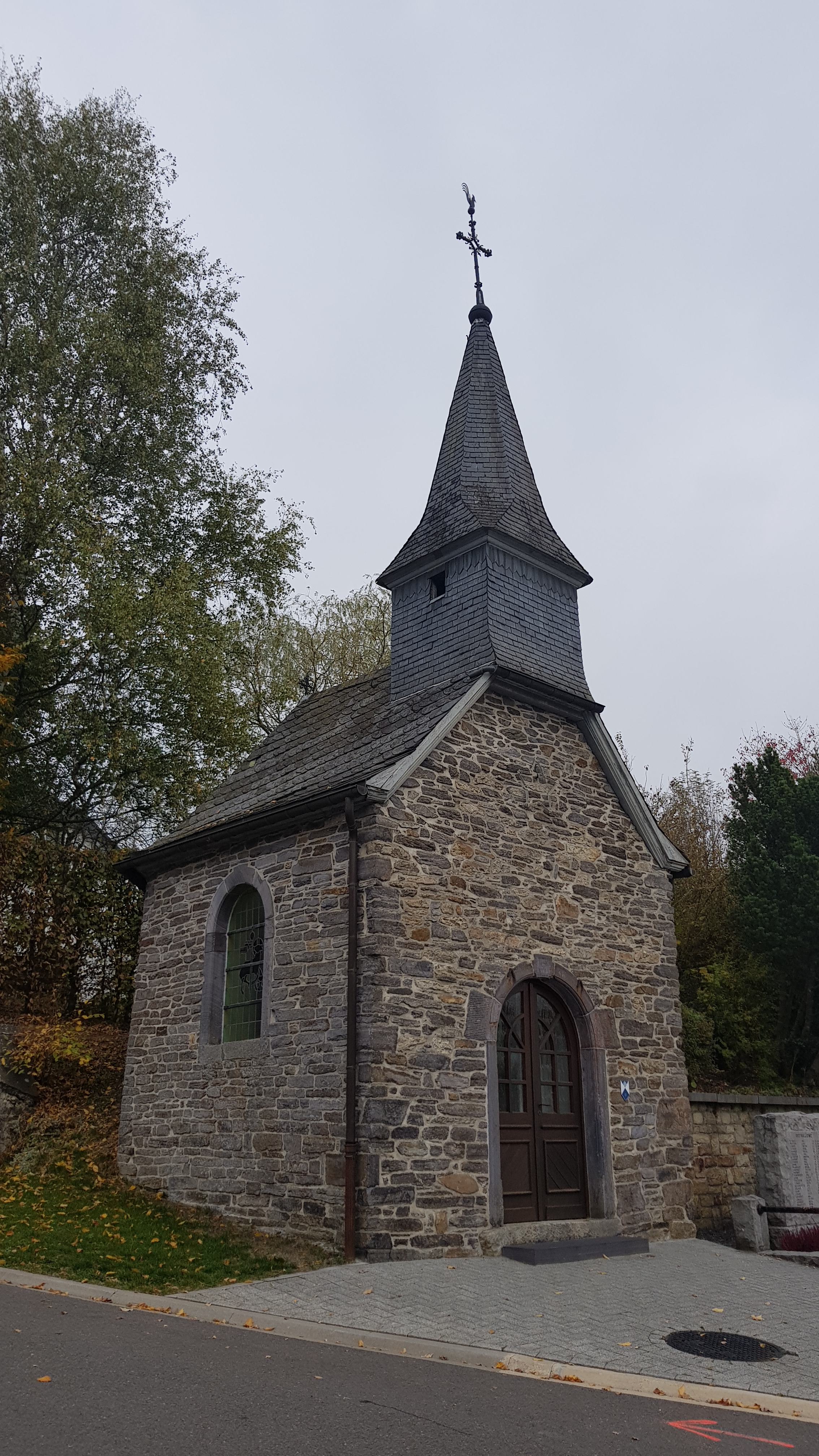 Marienkapelle, Recht, Sankt Vith, Belgien This photo of immovable heritage has been taken in the Walloon Region